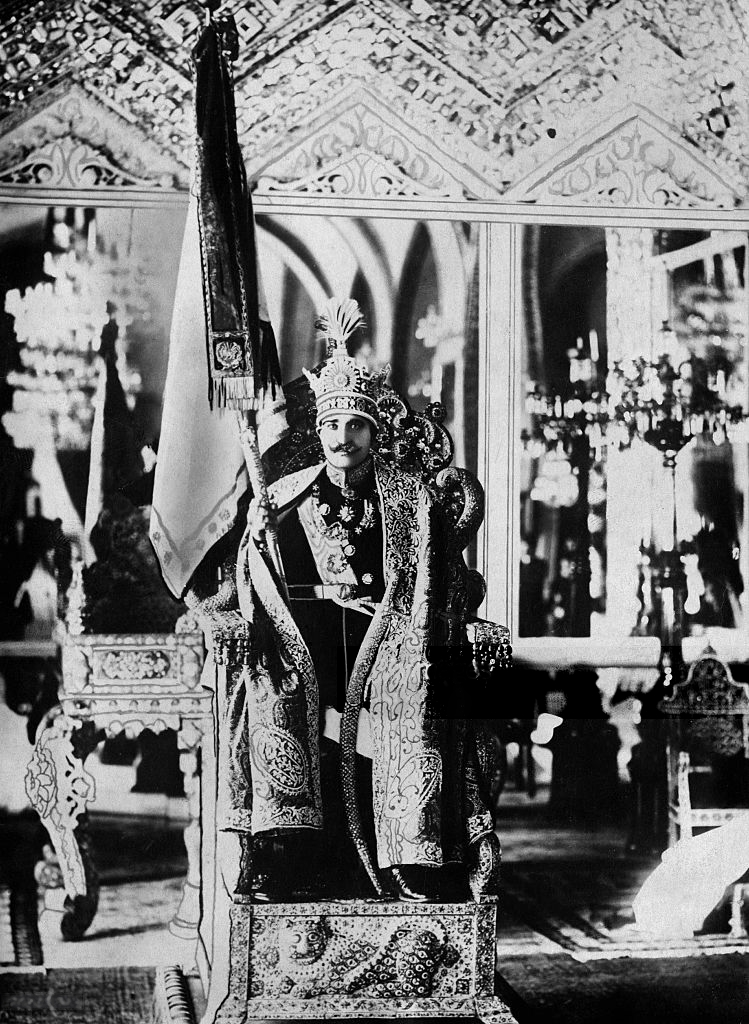 Reza Shah coronation